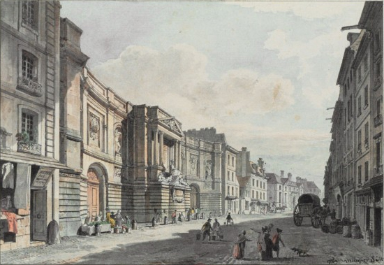 Dessin de la fontaine dite « des Quatre Saisons » construite en 1739-1745 par le sculpteur Edmé Bouchardon